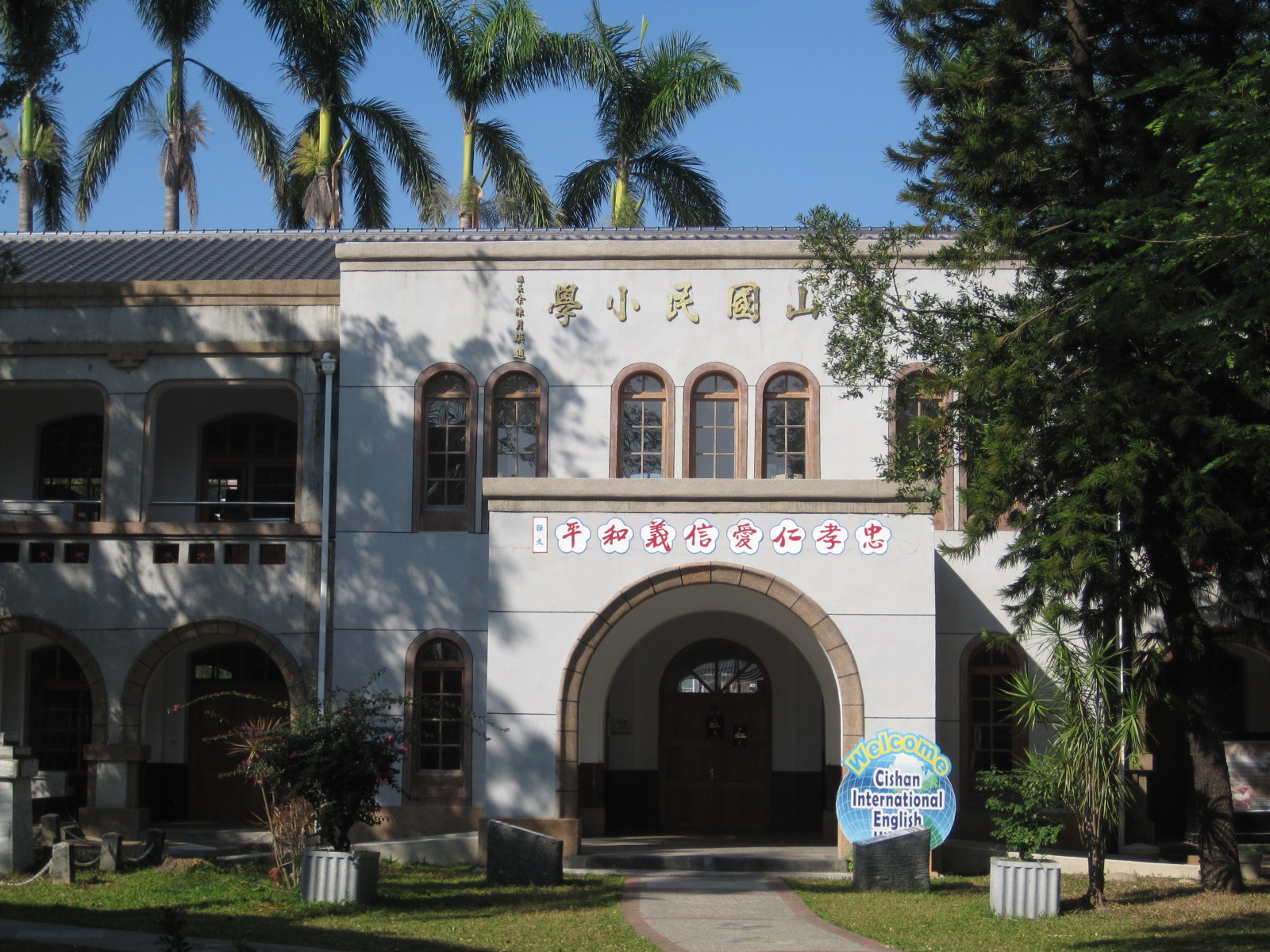 旗山國小舊校舍